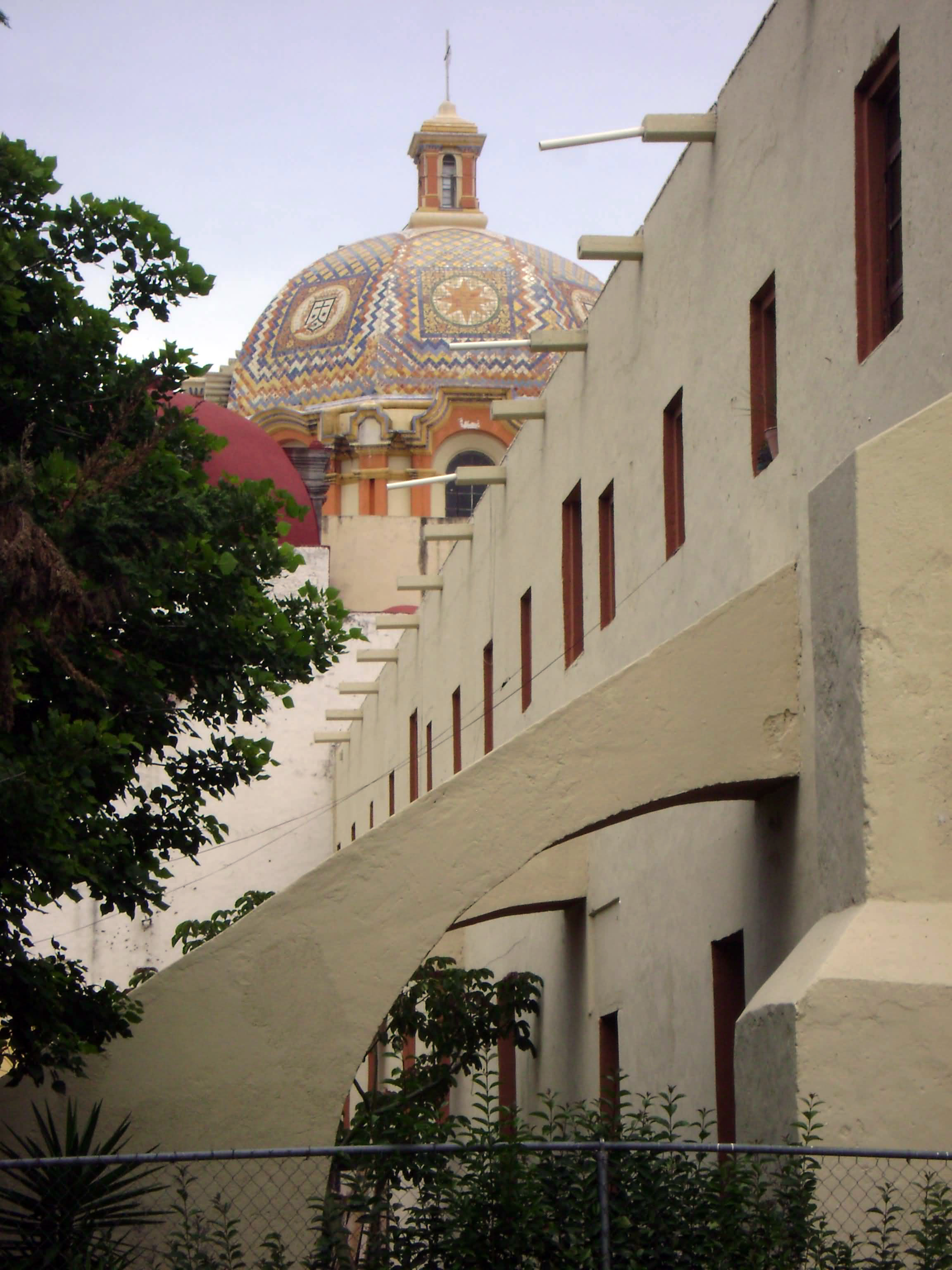 Complejp Cultural El Carmen Tehuacán Puebla México